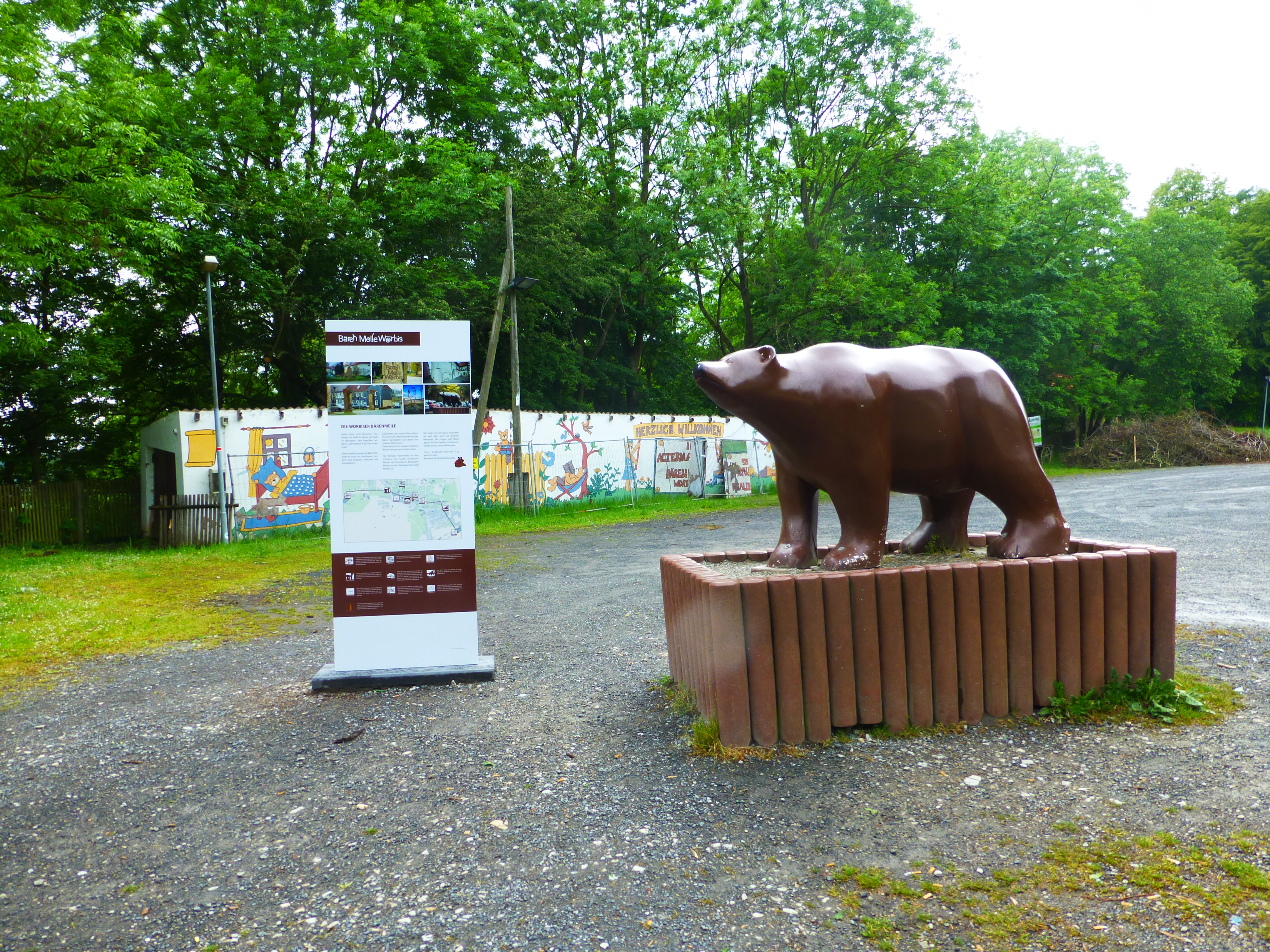 Bärenskulptur beim Bärenpark